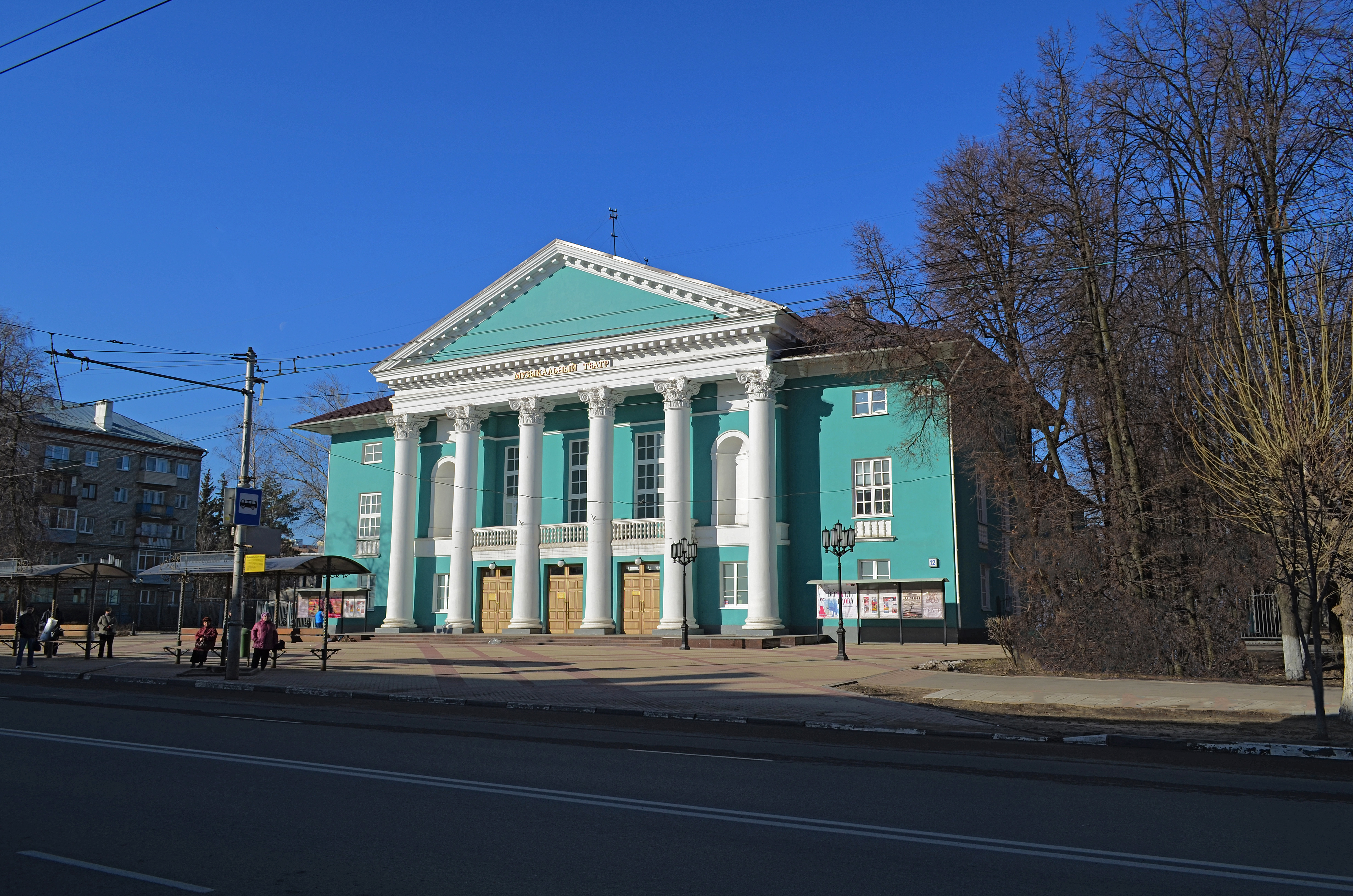 Рязань.Музыкальный театр.